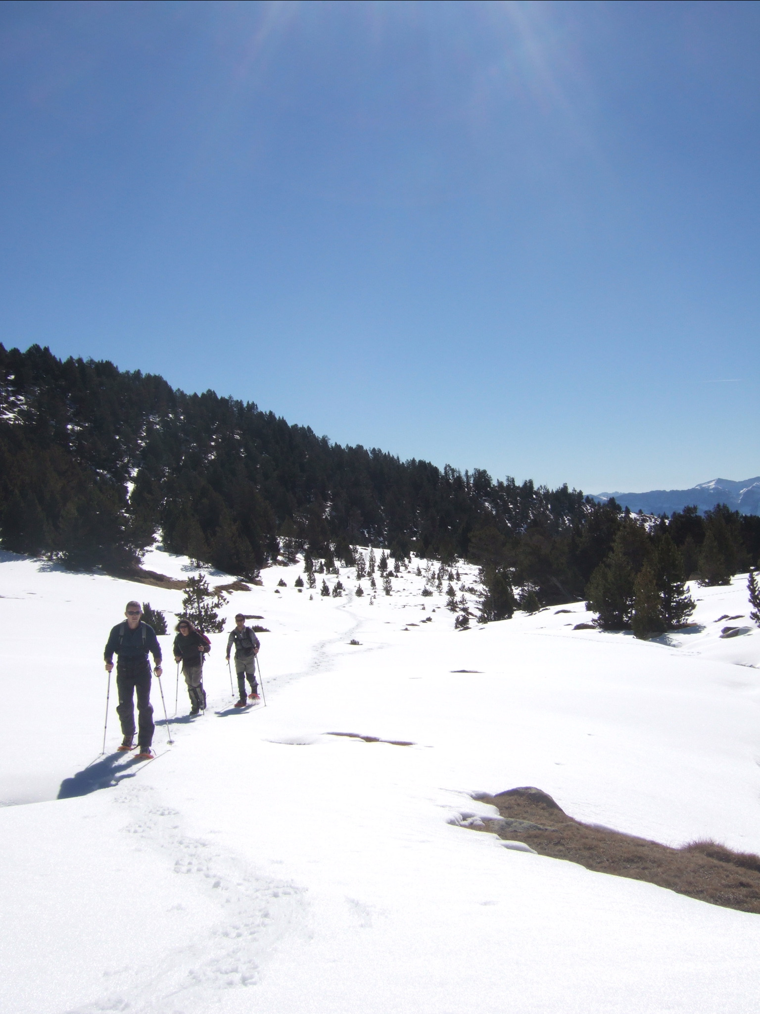 Pistes d'esquí de fons de Lles de Cerdanya